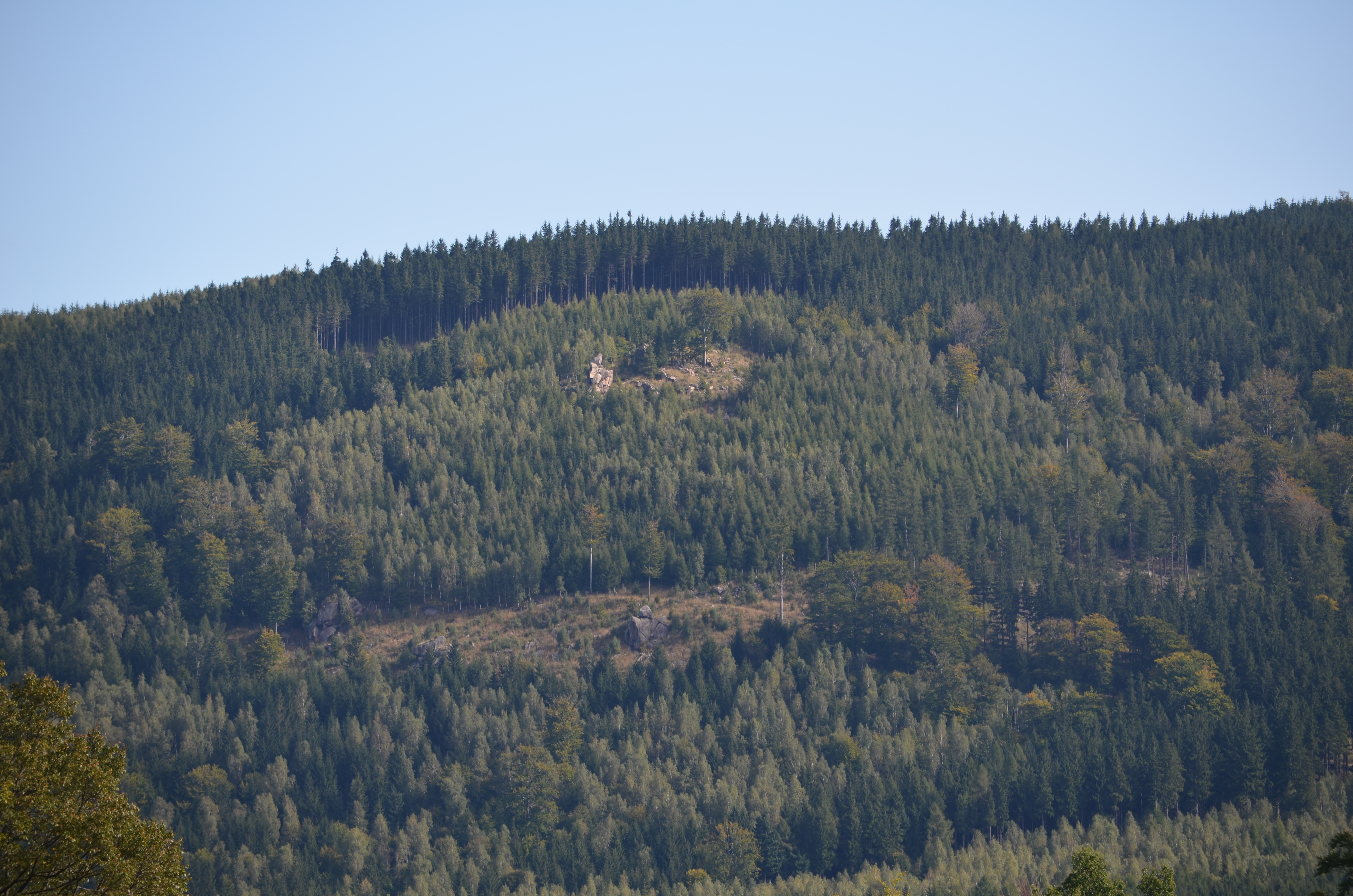 widok z Strużnicy